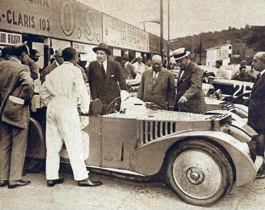 Le roi d'Espagne Alphonse XIII discute avec Léonard et Manzo de Zuniga, après leur victoire dans le Grand Prix Tourisme de Guypuzcoa 1926 (sur Chenard et Walcker).